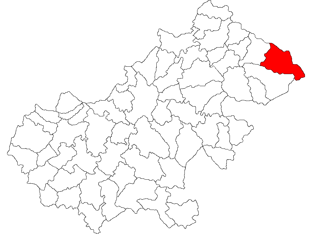 Categorie:Hărţi ale judeţului Satu Mare